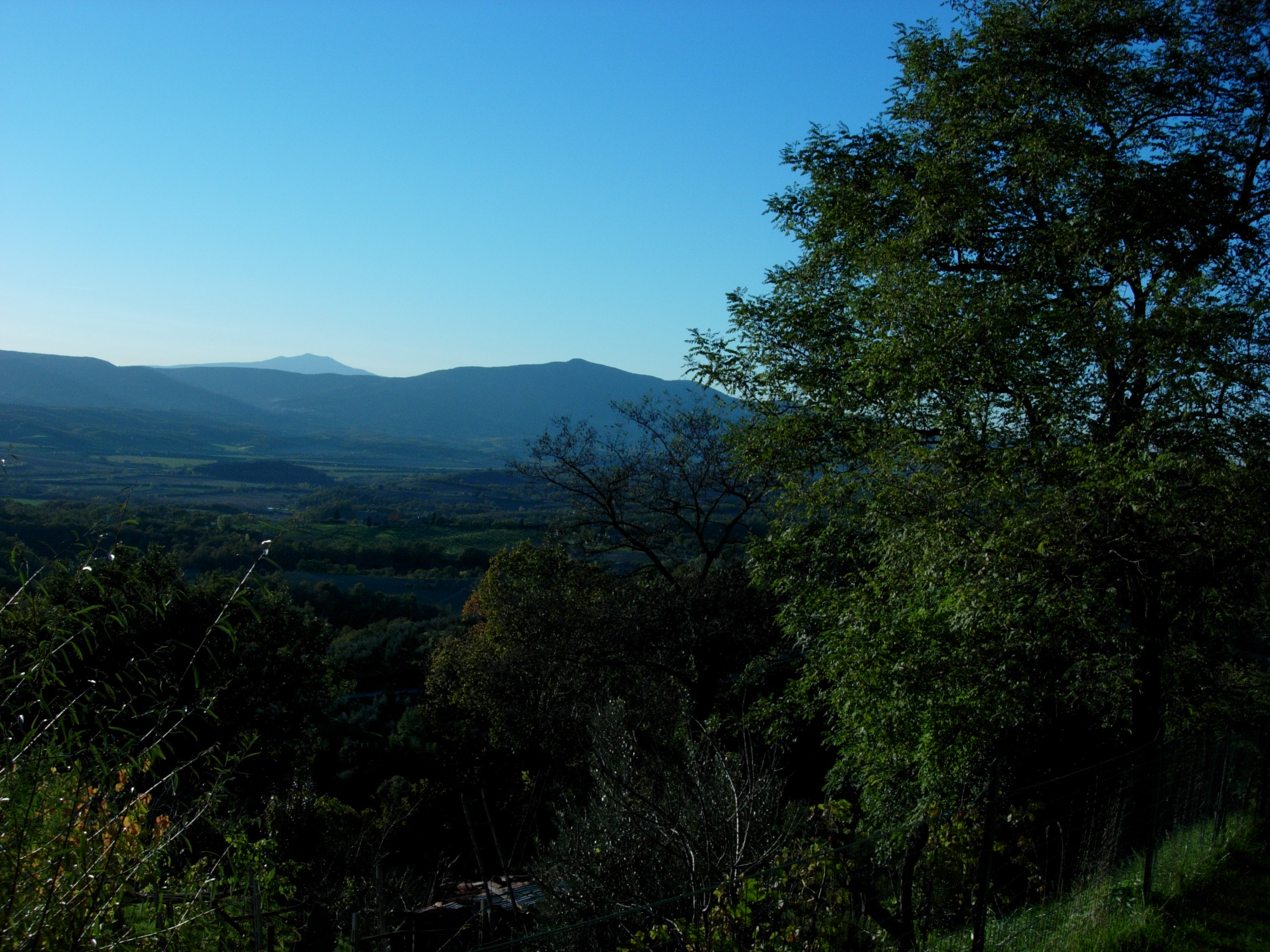 Vista della Valdichiana da Monteleone d'Orvieto